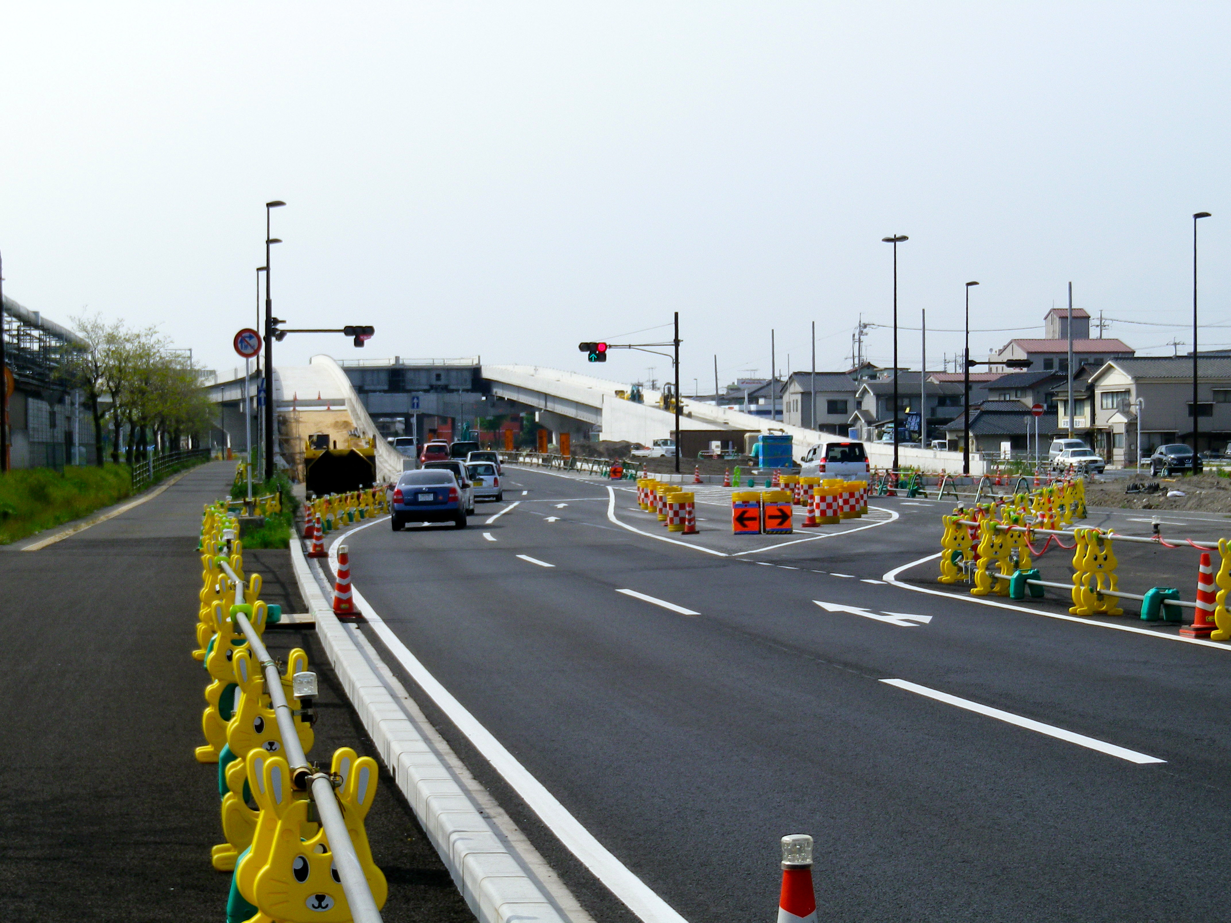 山口県宇部市。建設中の宇部湾岸道路西中町IC。